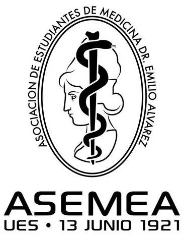 Logotipo de la Asociación de Estudiantes de Medicina "Doctor Emilio Alvarez" (ASEMEA) de la Universidad de El Salvador